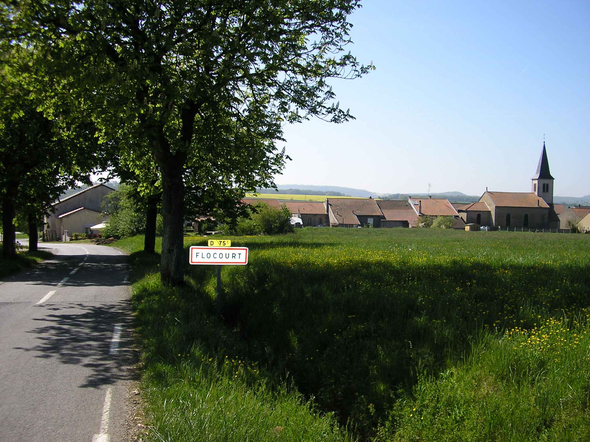 Flocourt, France